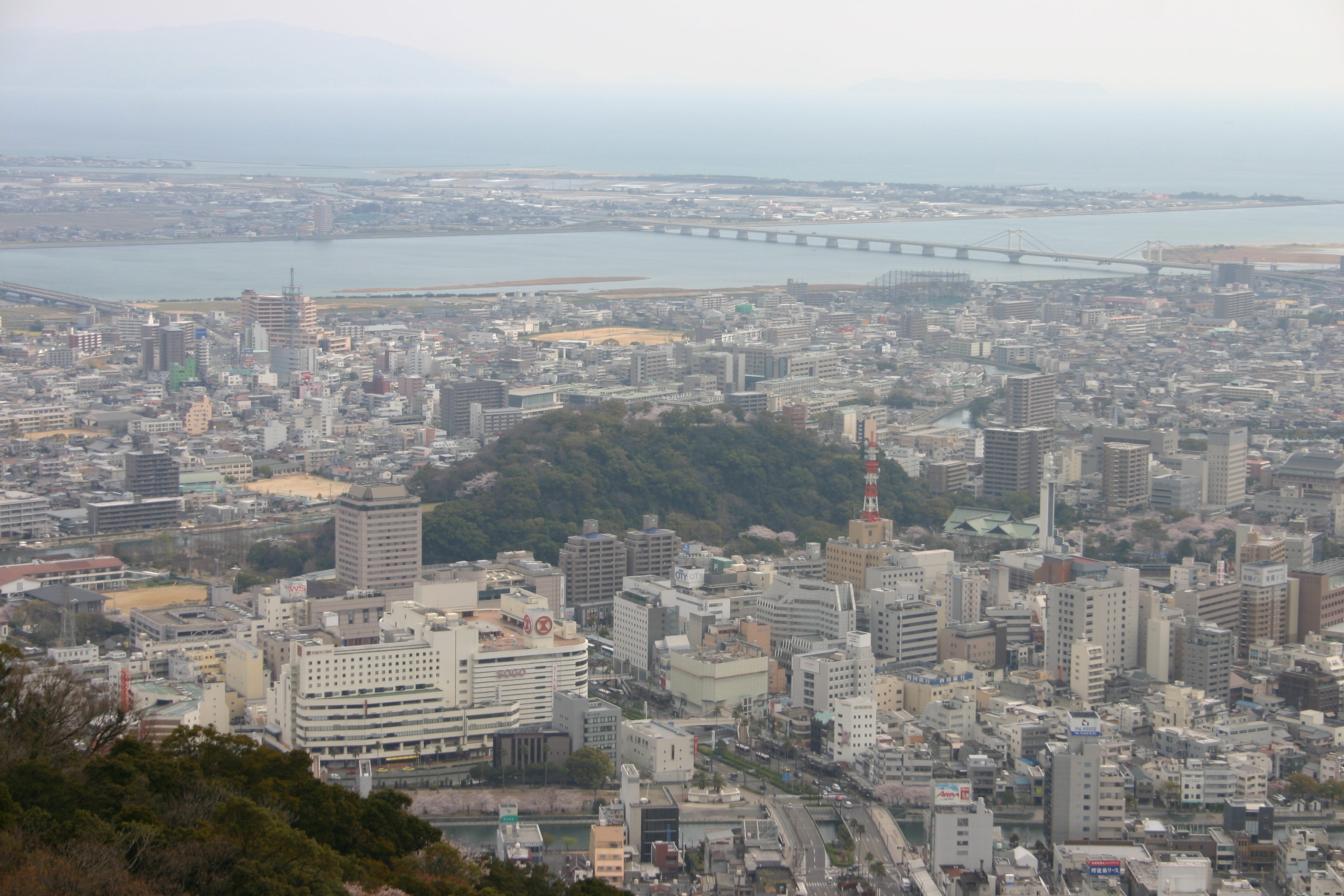 徳島市城山遠景